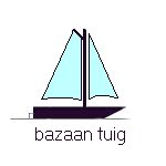 eigen tek.